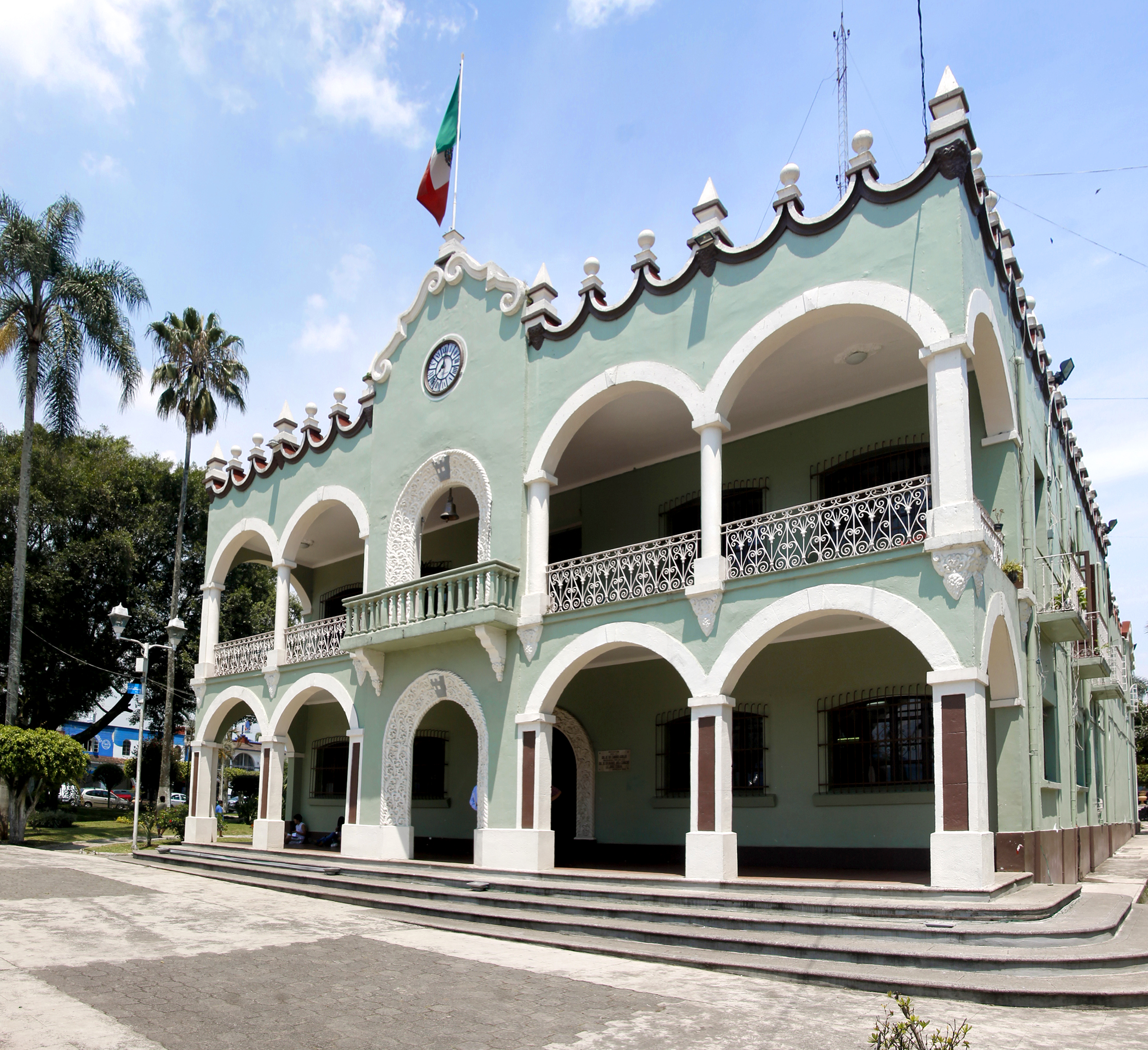 Palacio municipal de Fortin al dia 20 de abril de 2015